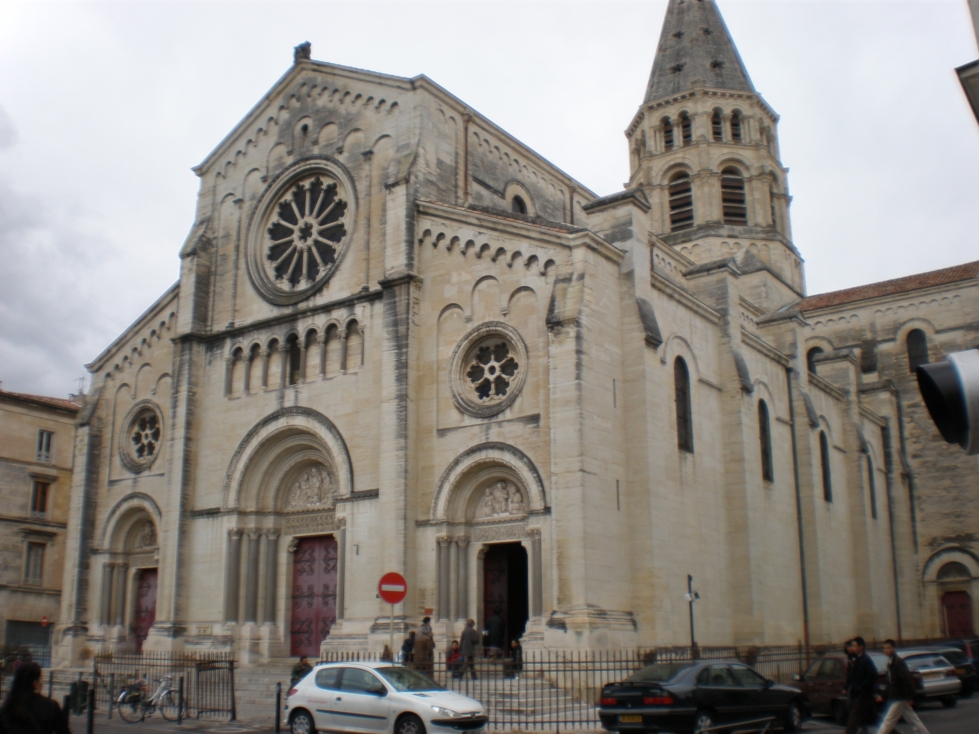 Eglise Saint-Paul de Nîmes (France)